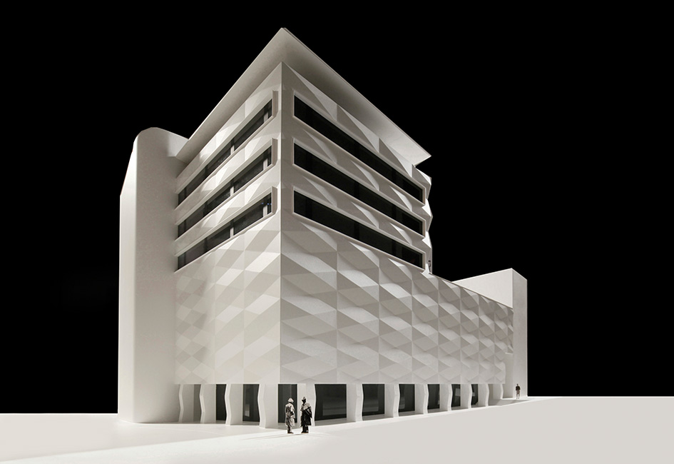 Einkaufszentrum Sonnenhof Rapperswil, Modellaufnahme